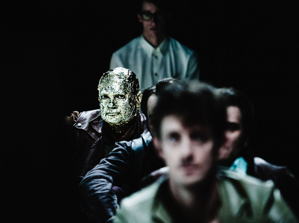 Tit Andronik prema tragediji Williama Shakespearea u režiji Igora Vuka Torbice premijerno je izveden u sezoni 2017/2018.